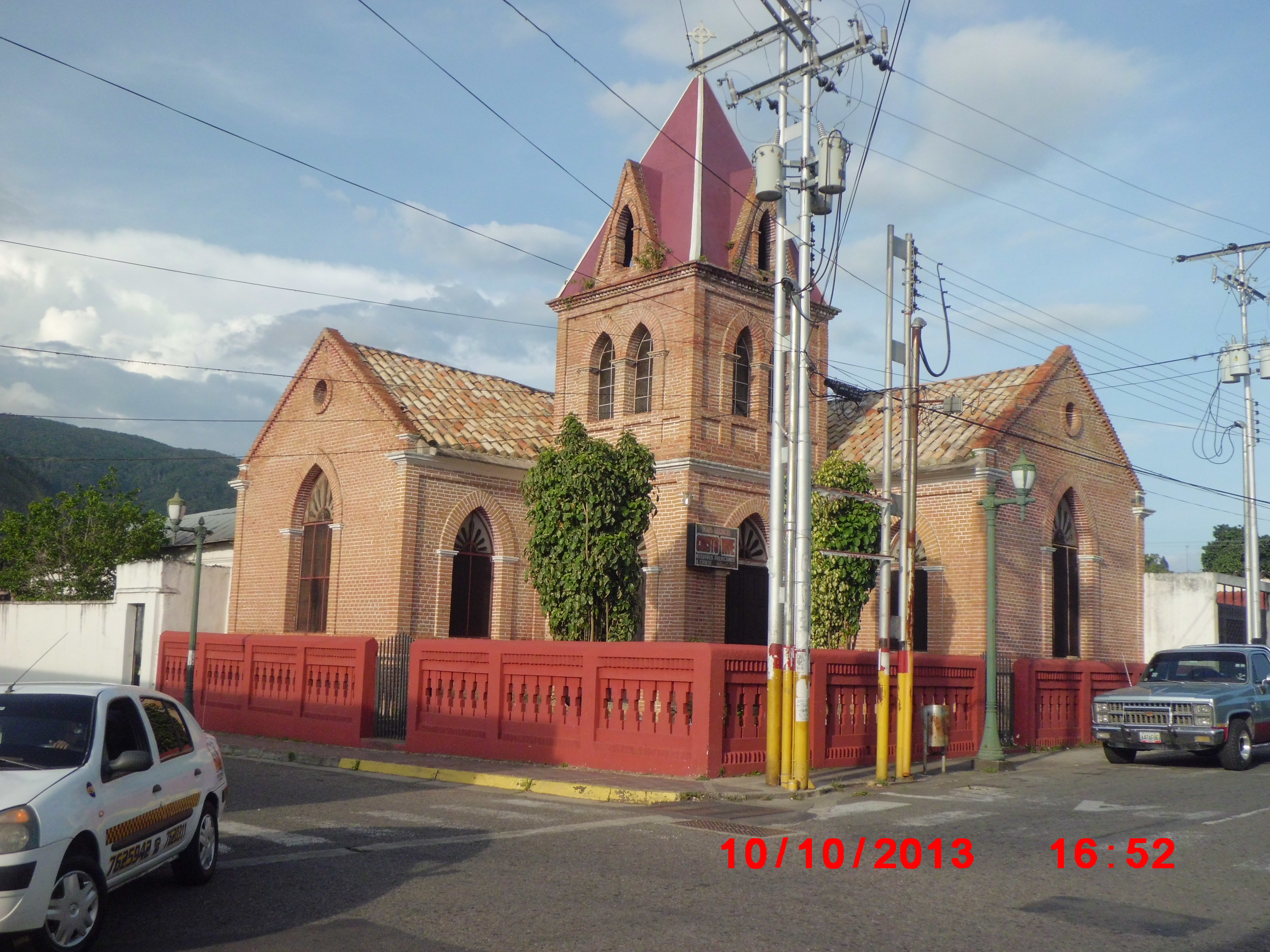 Iglesia Cristo Vive. Monumentos de Rubio, Venezuela